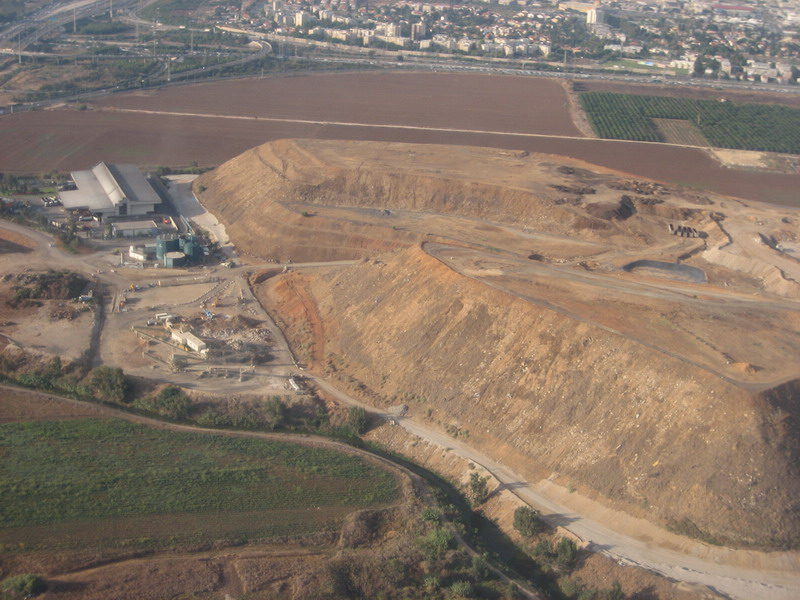 taken by he:משתמש:אסף.